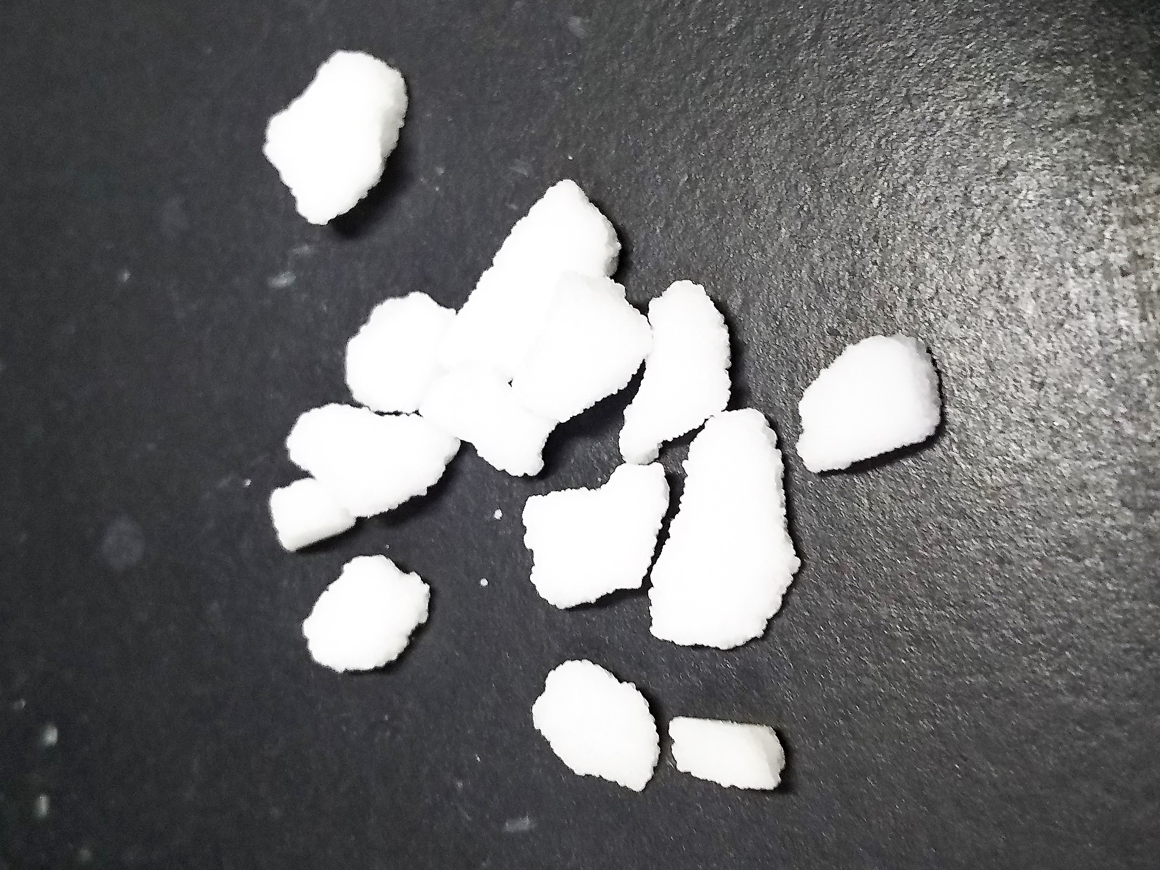 シアン化ナトリウム（和光純薬工業にて購入）